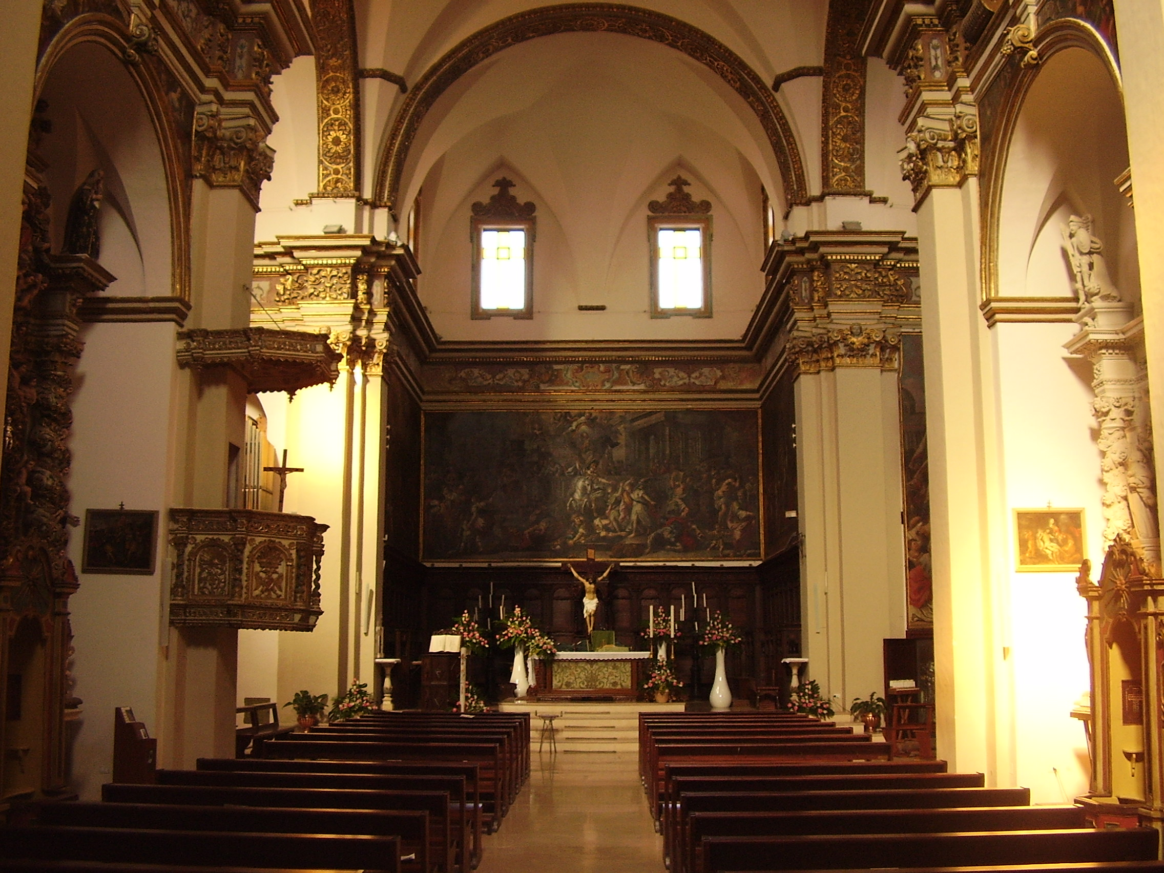 Chiesa Natività Ruffano Interno